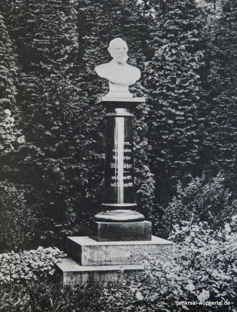 Fotografie des Otto-Jäger-Denkmals auf der Kaiser-Friedrich-Höhe in Wuppertal